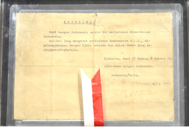 TEKS PROKLAMASI KEMERDEKAAN BANGSA INDONESIA KETIKAN YANG DITANDATANGANI OLEH SOEKARNO DAN MOHAMMAD HATTA